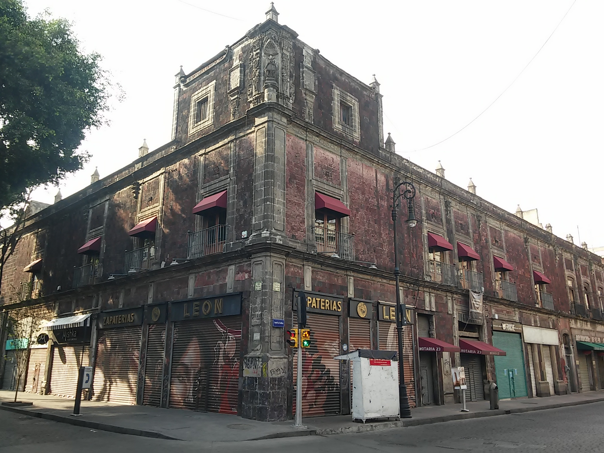 La sección mejor conservada de lo que fueron las Casas del marquesado del valle de Oaxaca en la esquina de Tacuba e Isabel la Católica, centro histórico de la ciudad de México